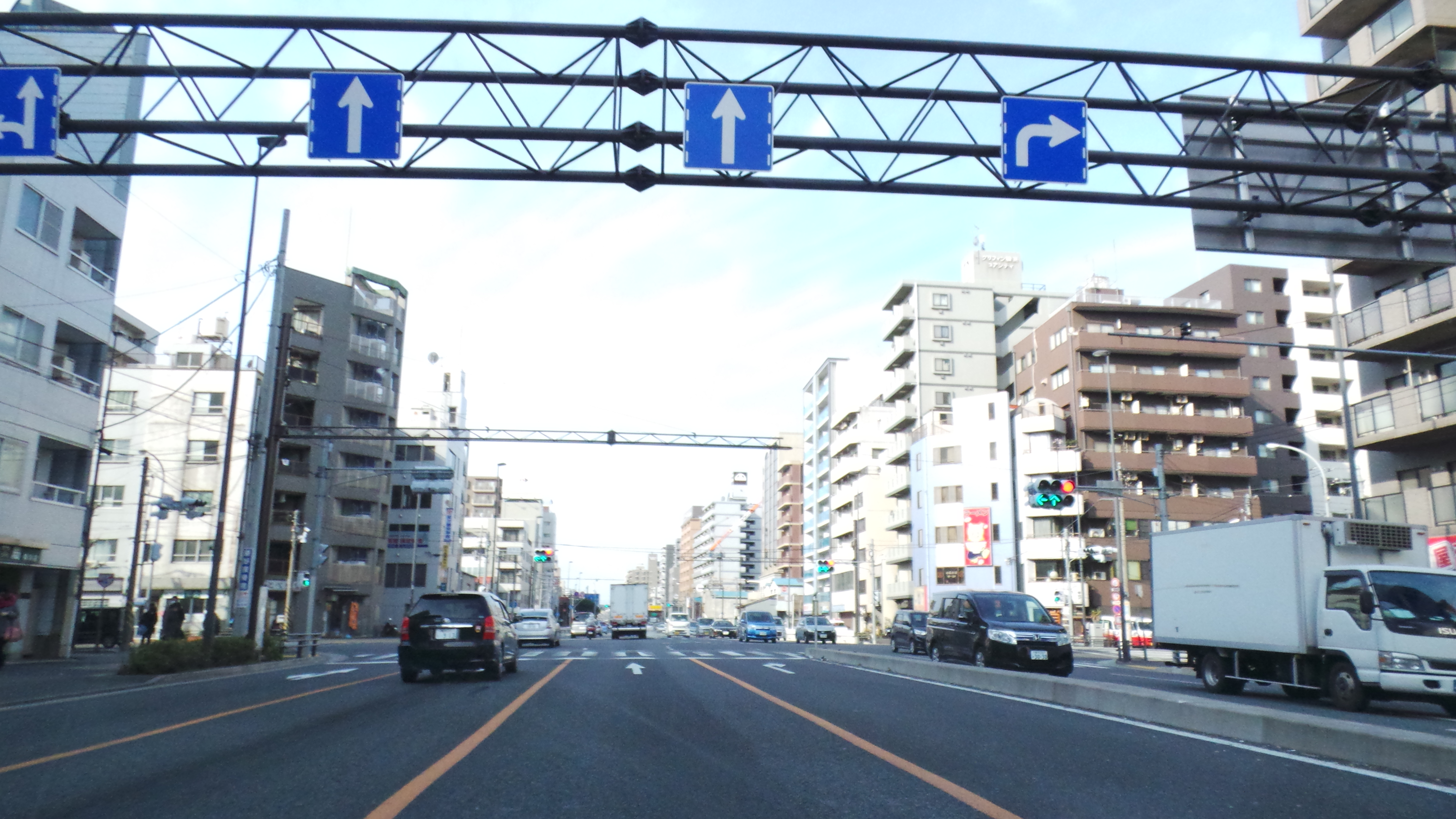 1 Chome Chūō, Nishi-ku, Yokohama-shi, Kanagawa-ken 220-0051, Japan